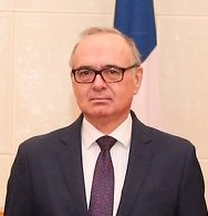 Olivier Chambard, französischer Botschafter in Osttimor und Indonesien